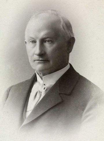 portrett, mann, fabrikkeier, vignettert brystbilde, Langaard, Conrad Christian Parnemann.